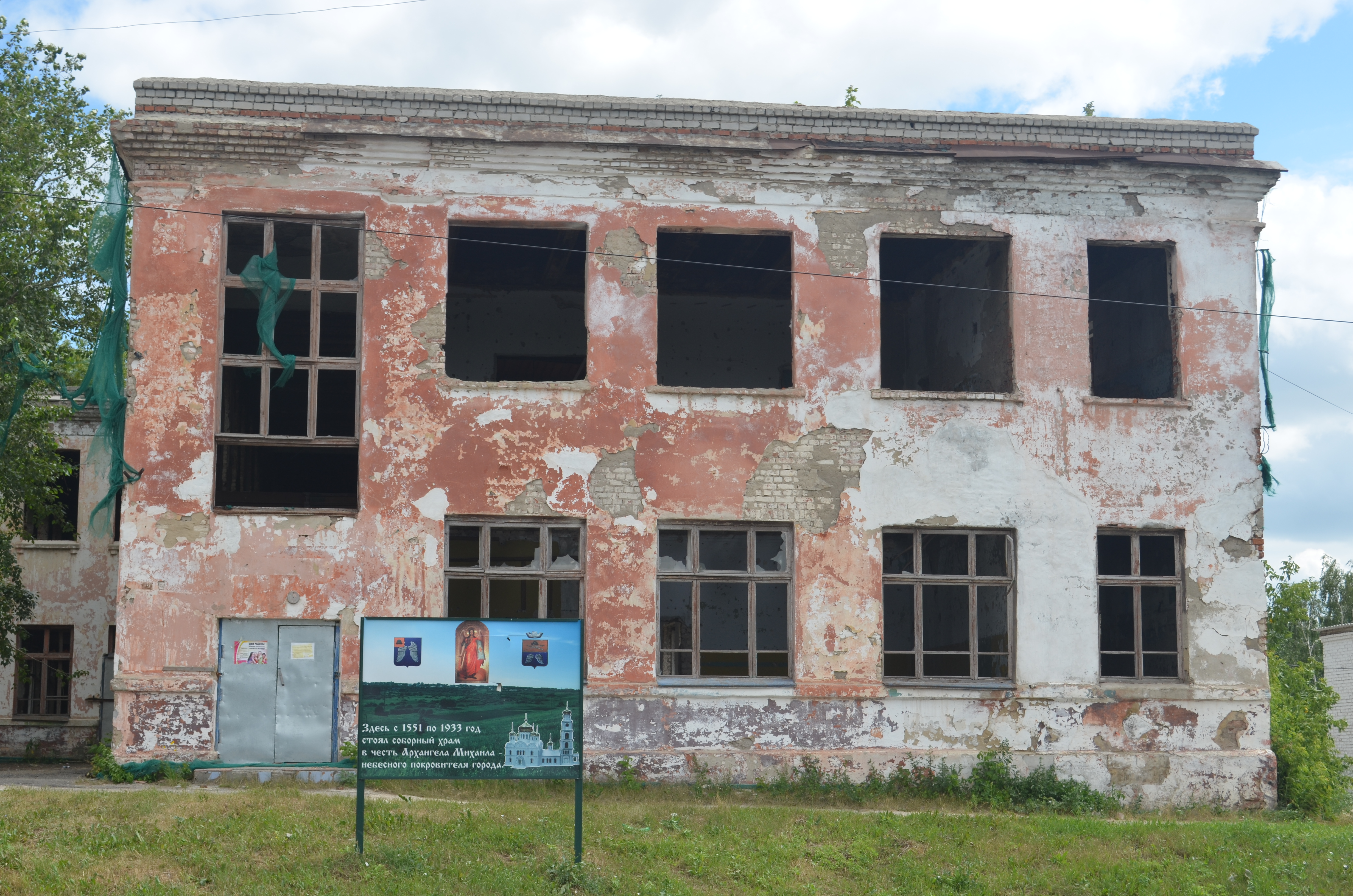 заброшенное помещение на месте Архангельского храма в Михайлове